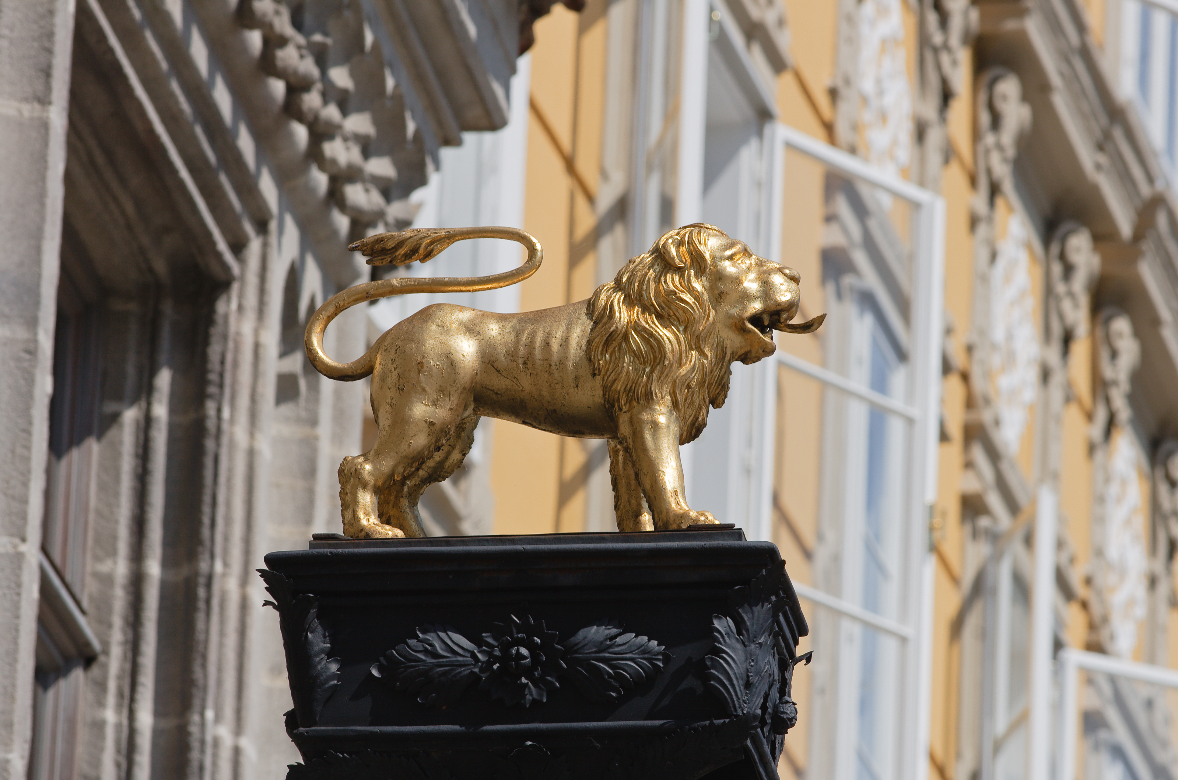 Die Löwenstatuette auf dem Ausleger des Steyrer Bummerlhauses (Stadtplatz 32).